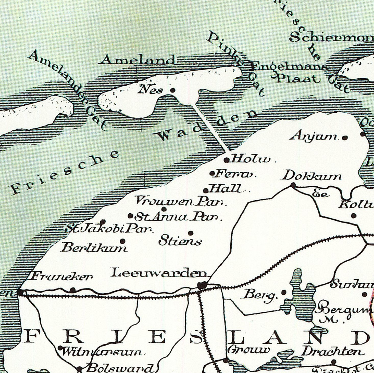 Dam naar Ameland in de Bosatlas van 1877